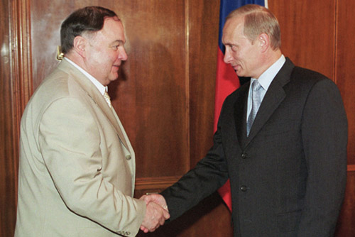 НОВО-ОГАРЕВО. С Президентом Республики Адыгея Хазретом Совменом.